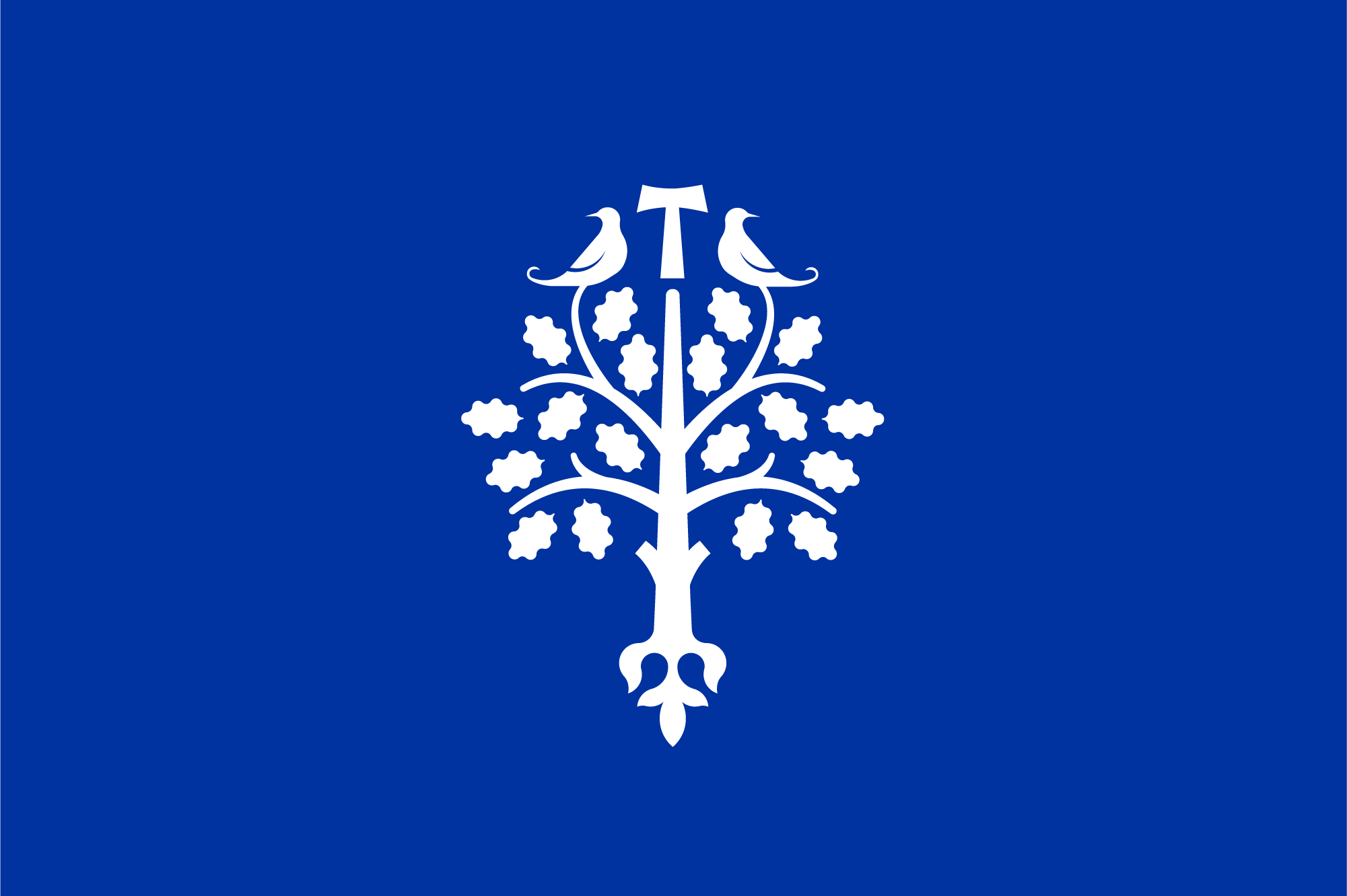 Bandera de La Selva del Camp